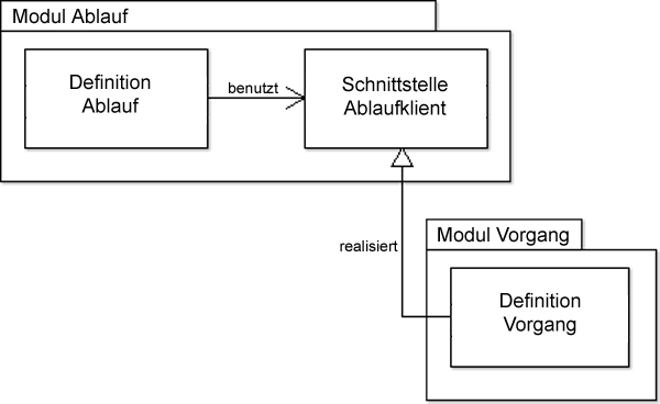 Die Darstellung zeigt die Strukturierung von Modulen durch das Dependency Inversion Principle.